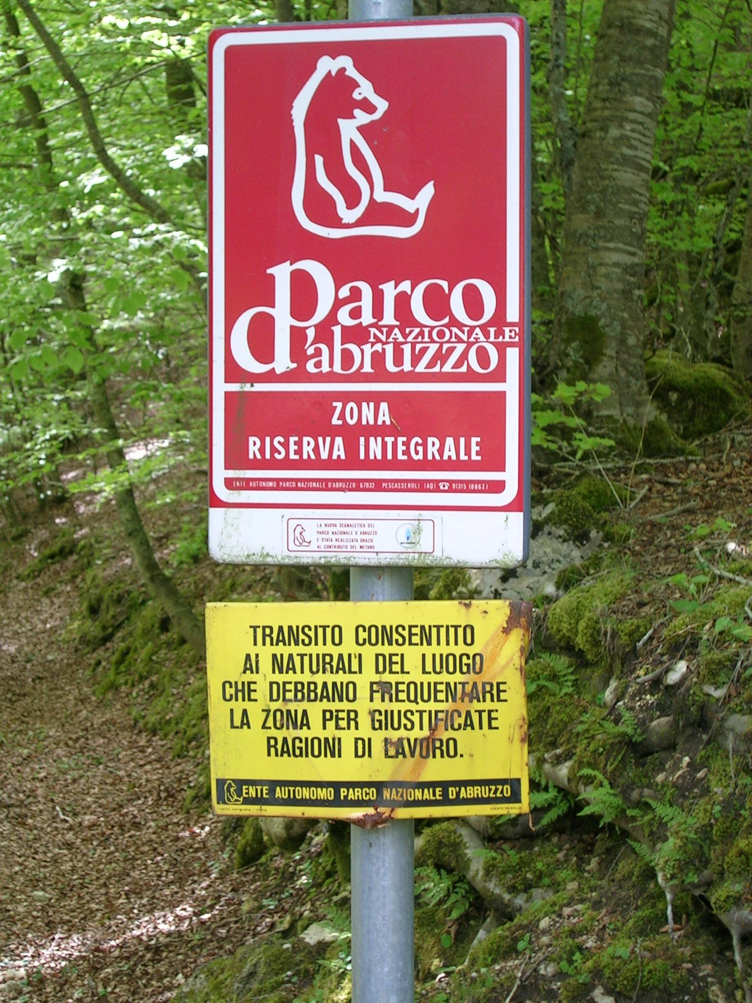 Riserva Integrale in Parco nazionale d'Abruzzo, Lazio e Molise